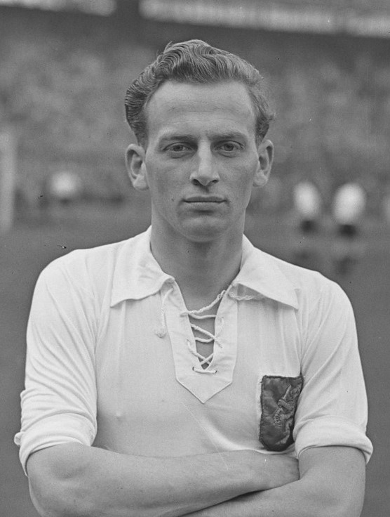 Willy Schmidt in 1953.